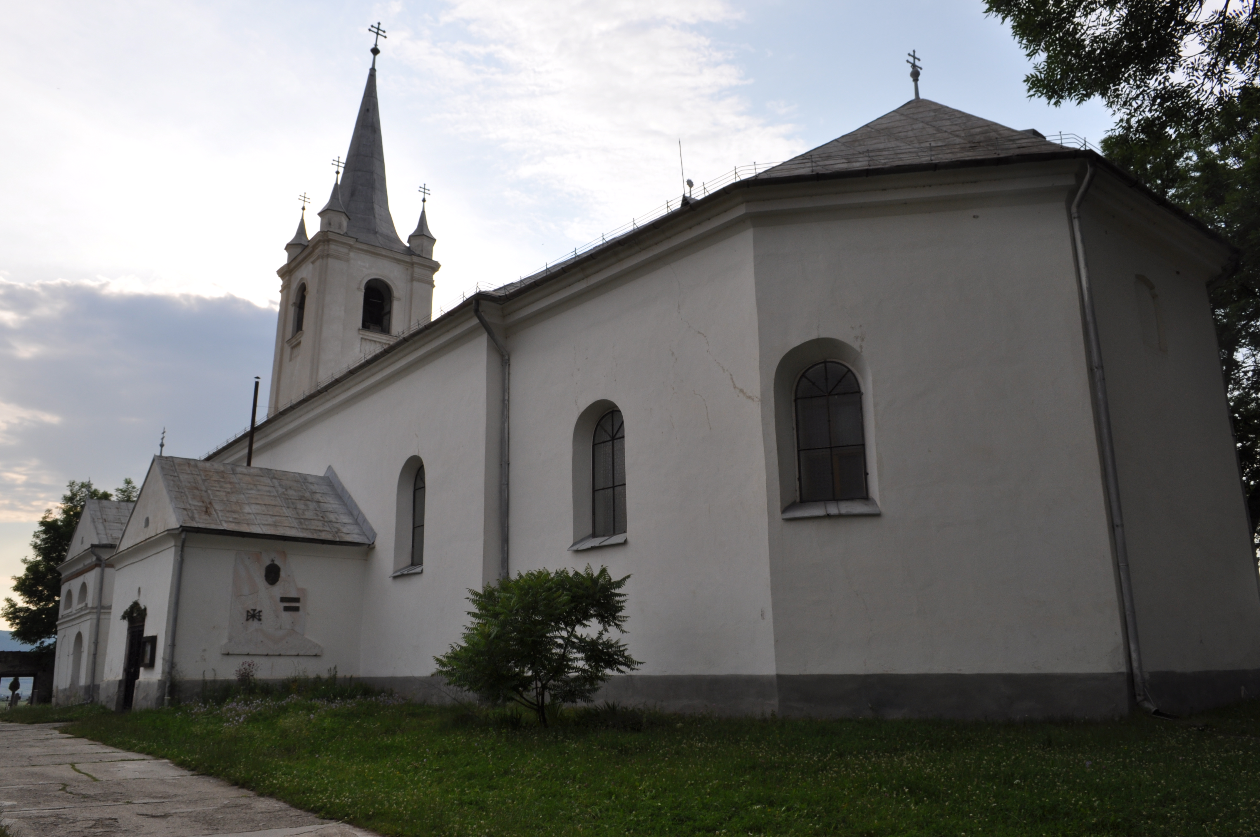 Sânmartin, Harghita